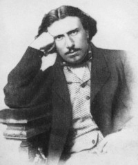 Nikolai Leskov